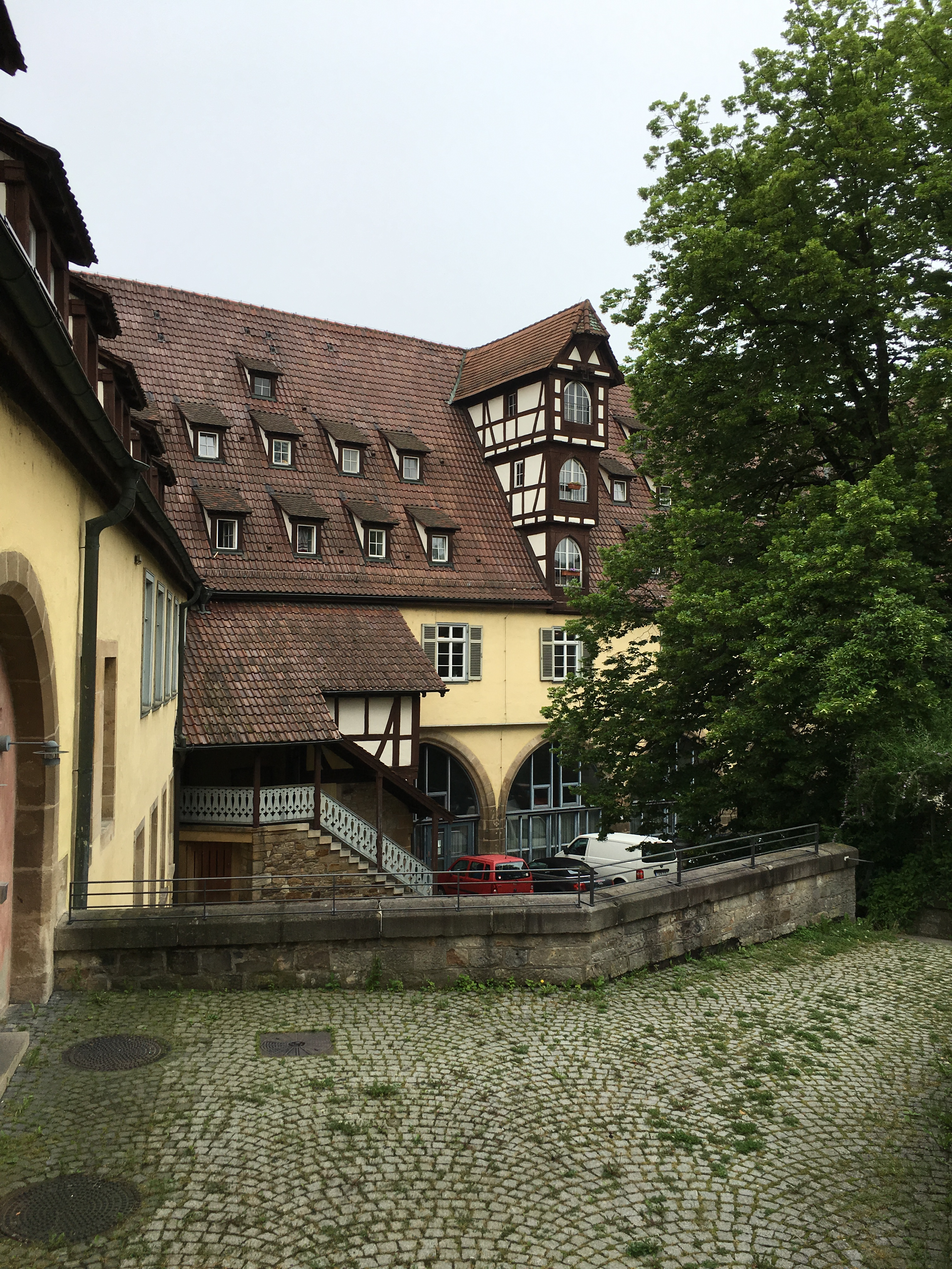 Bebenhäuser Pfleghof Tübingen Ansicht Innenhof